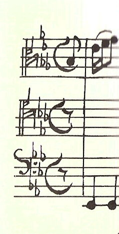 פרט מתוך כוראל של באך לעוגב